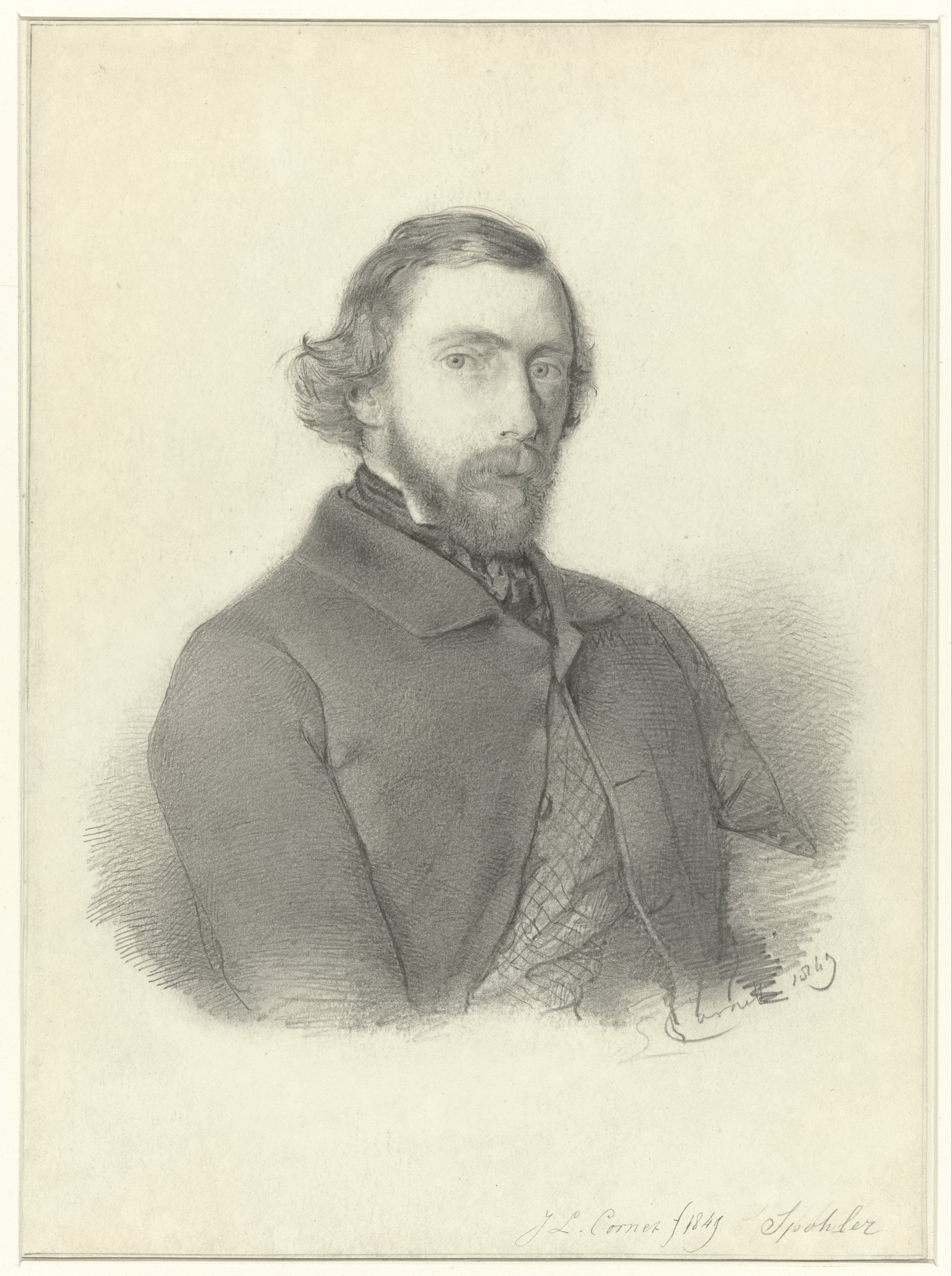 Portret van de schilder Jan Jacob Spöhler door Jacobus Ludovicus Cornet